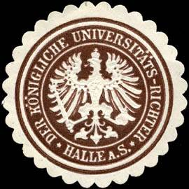 Sealing stamp Title: Der Königliche Universitäts - Richter - Halle Description: braun, weiß, geprägt Place: Halle size: 3 cm